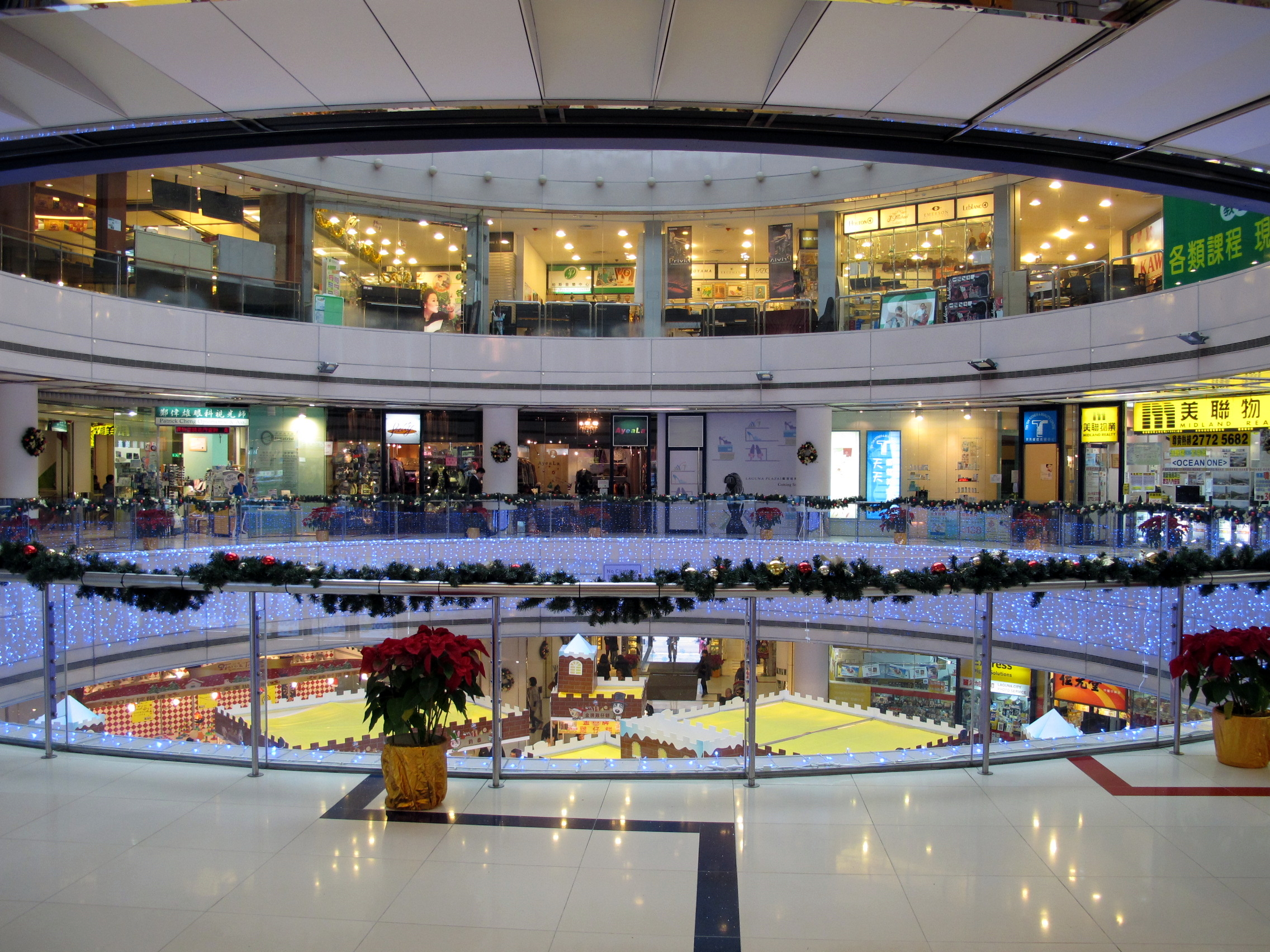 Laguna Plaza Void